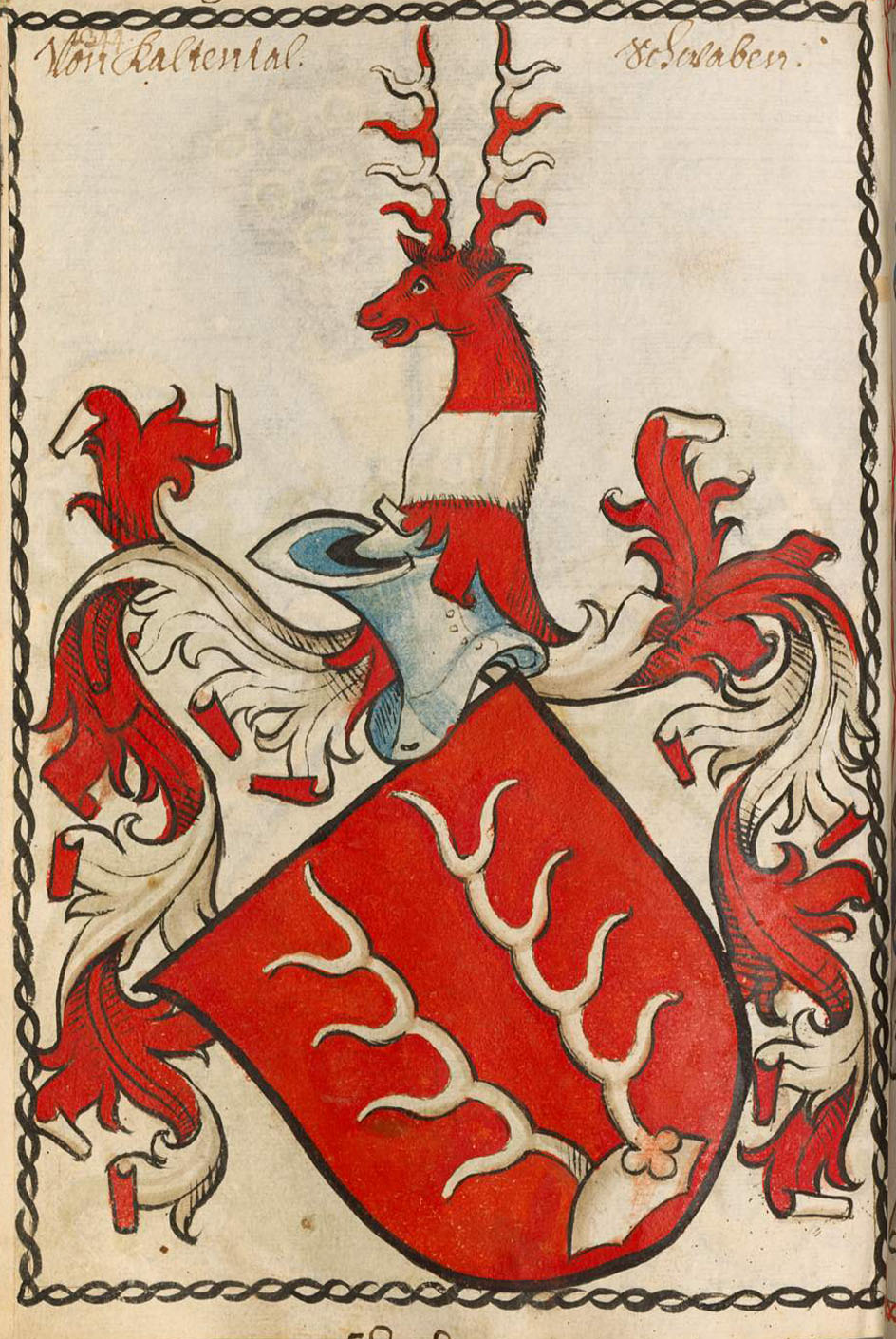 Scheibler'sches Wappenbuch, älterer Teil Kaltental